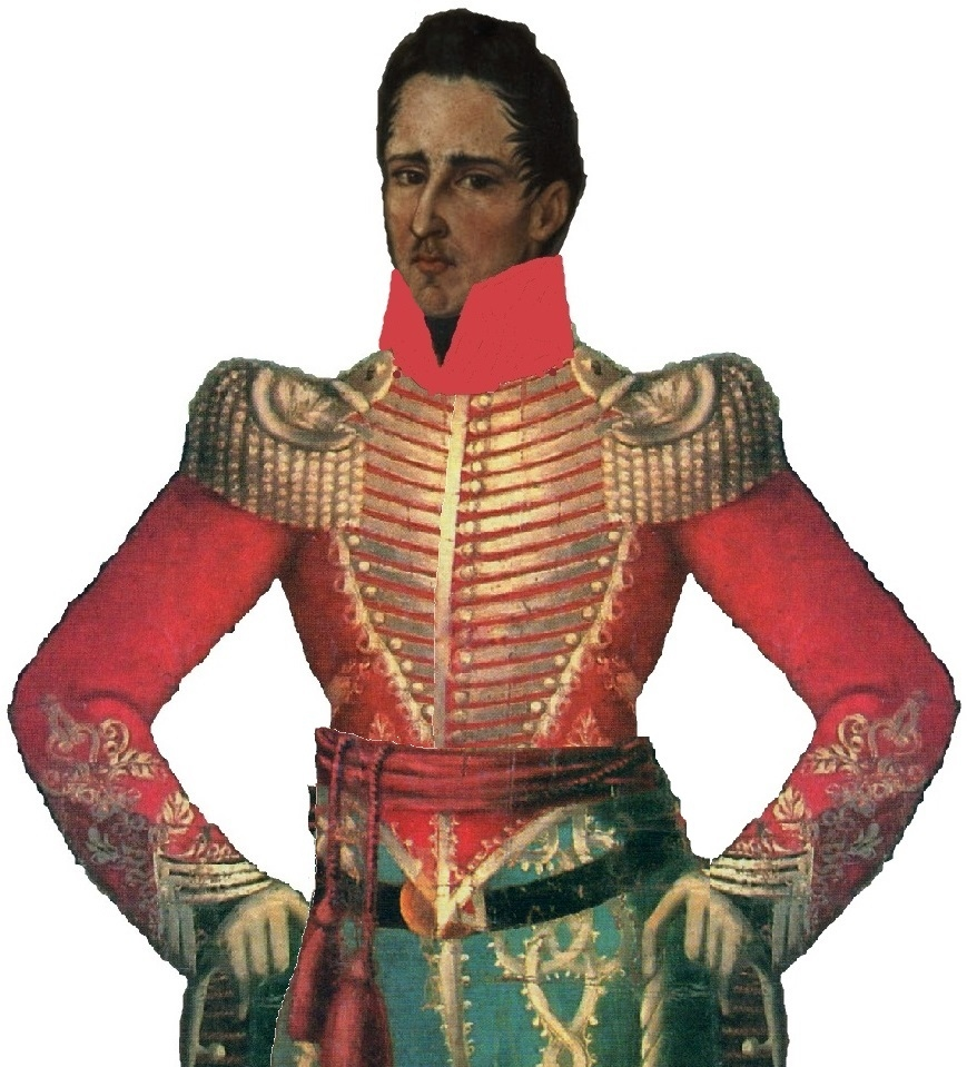 José María Córdova usando la chaqueta roja de guerra, para infundir terror en el enemigo y para ocultar la sangre, la llevaba puesta José María Córdova el día que peleo en La batalla de El Santuario el 17 de octubre de 1829.